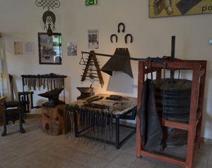 Kovárna z Lišic ve stálé expozice řemesel a živností na Přešticku